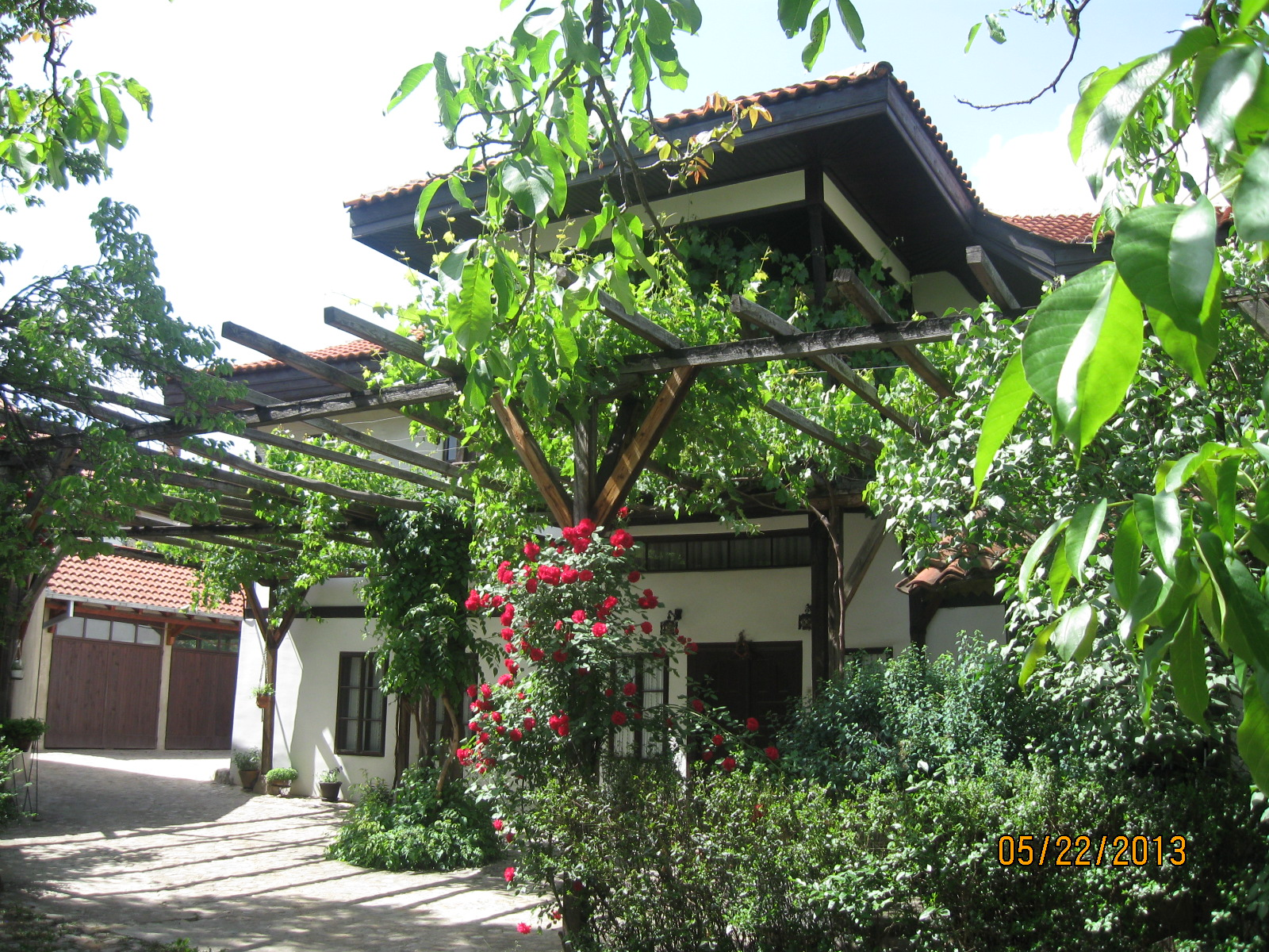 Кућа Драгутина Влајинца